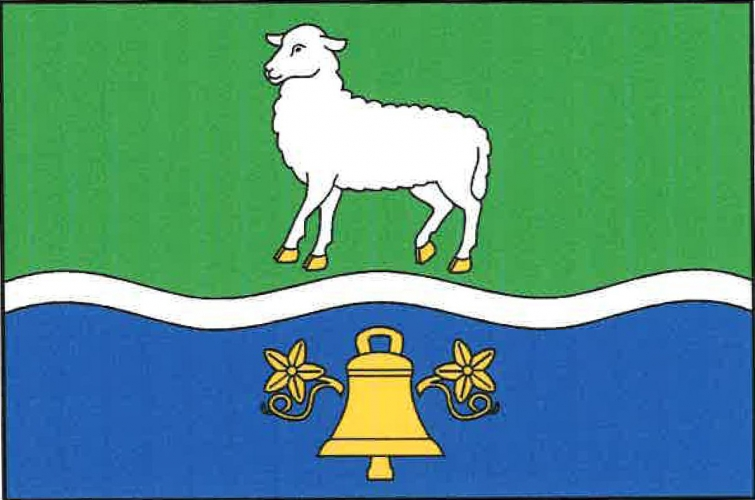 vlajka, Ovčáry, okres Mělník